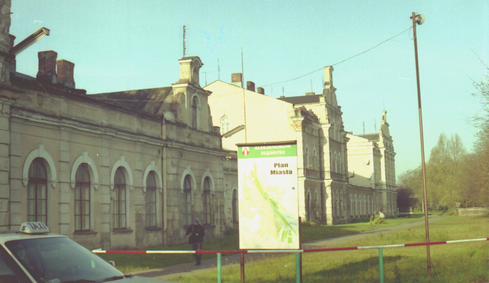 Aleksandrów Kujawski, Railway